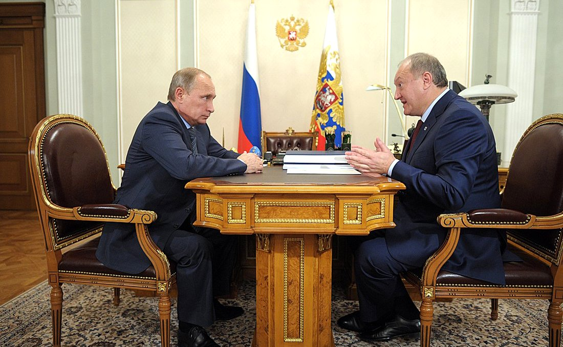 Рабочая встреча с Президента России Владимира Путина с губернатором Камчатского края Владимиром Илюхин